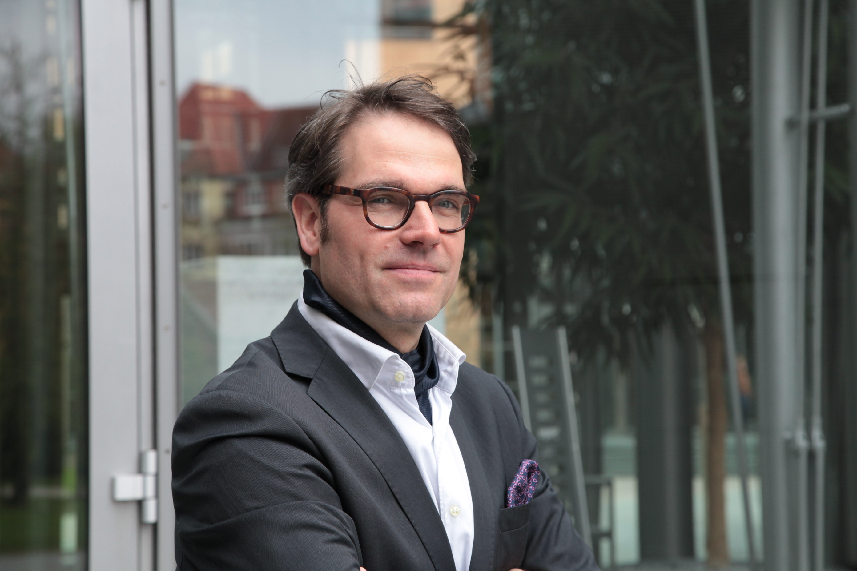 Porträt